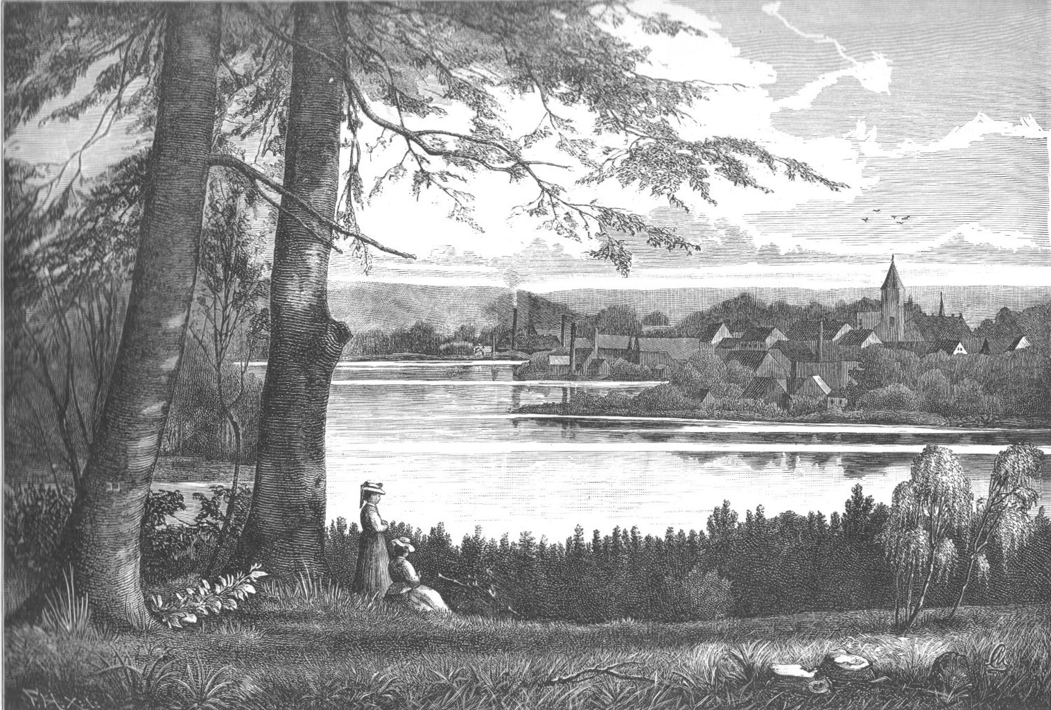 Udsigt fra "Fruens Bænk" mod Silkeborg. "Fruens Bænk" er et udsigtpunkt paa Toppen af Bakken ved Kalgaardsvig, der er en lille Bugt af Silkeborg Lang Sø.